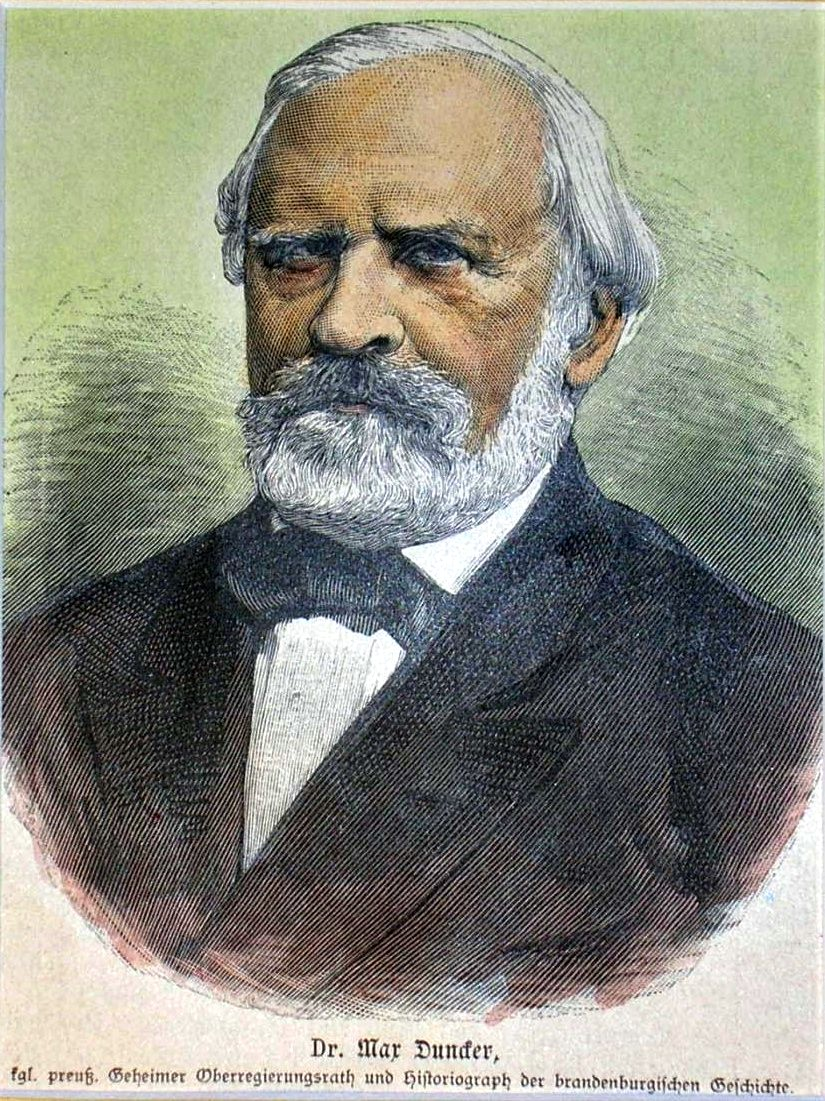 Max Duncker, 1885, teilkolorierter Holzstich, ca. 12,5 x 10,5 cm